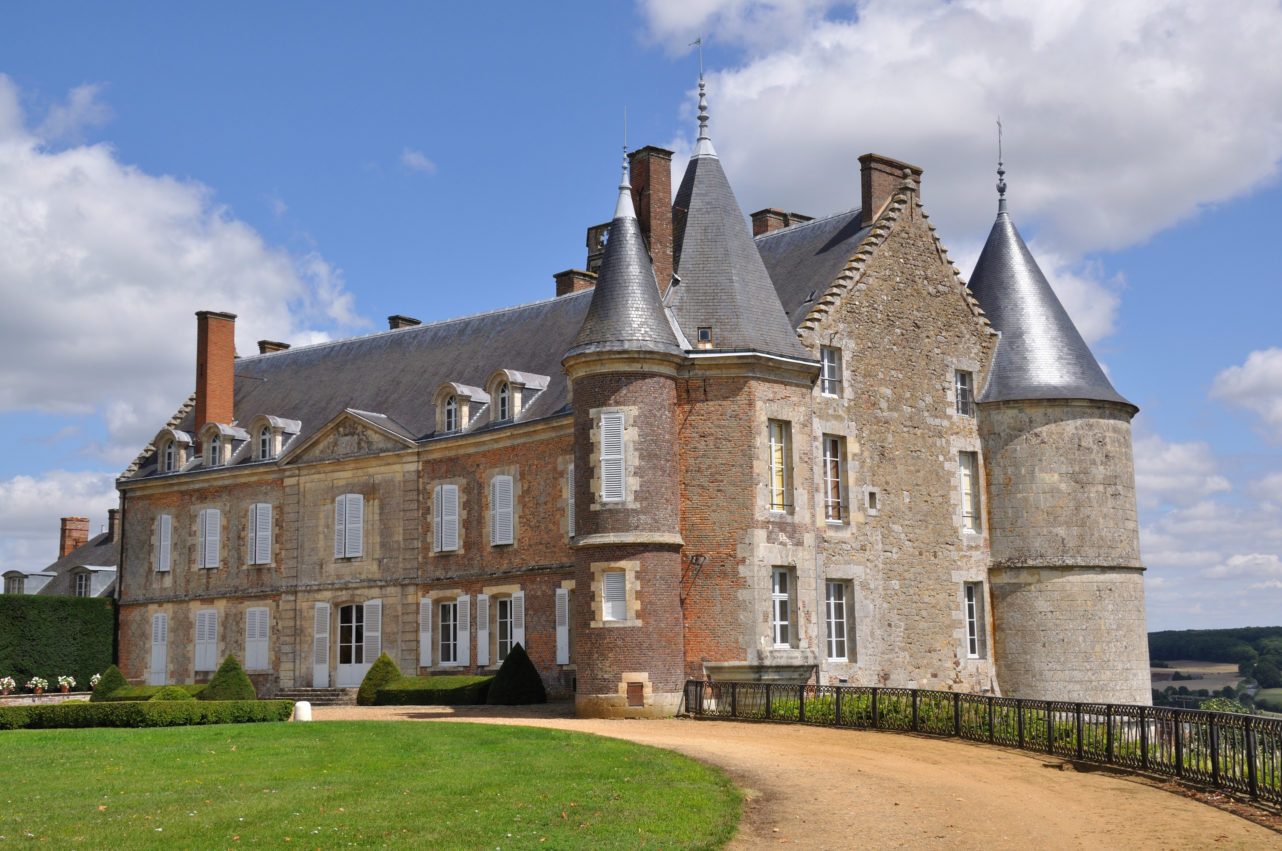 Château de Montmirail dans la Sarthe